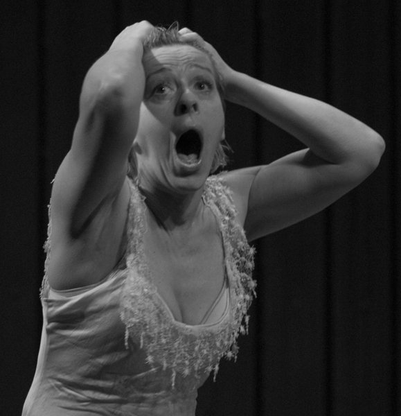 Milena Zupančič in Machbeth After Shakespeare Heiner Muller director :Ivica Buljan Mini teater Ljubljana ZKM